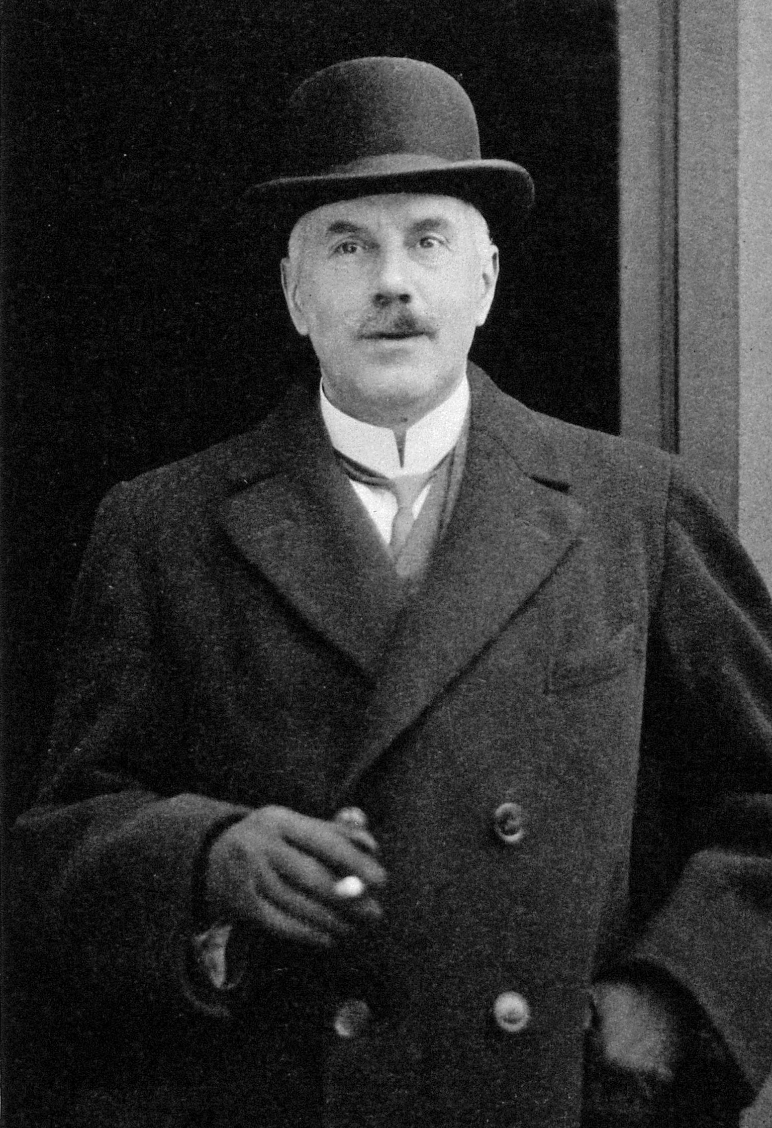 John Dixon Comrie